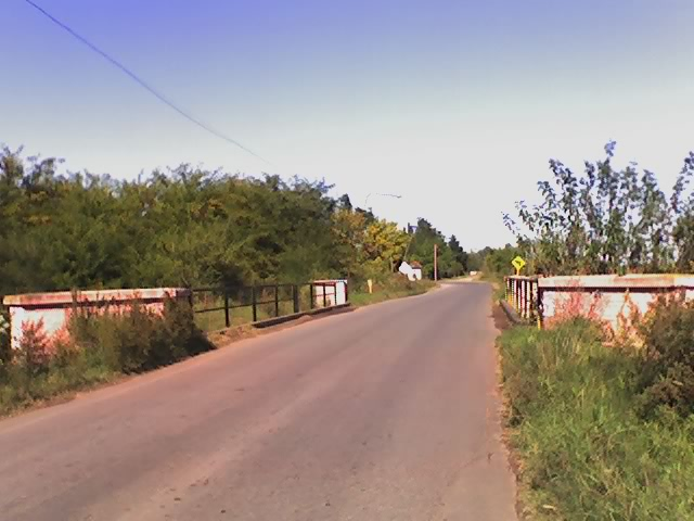 Town of Veinte de Junio, La Matanza Partido, Buenos Aires Province.